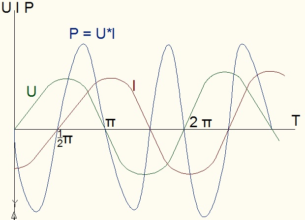 Diagrama que muestra el desfasaje angular que posee la intensidad de corriente respecto de la tensión aplicada en un circuito inductivo puro.